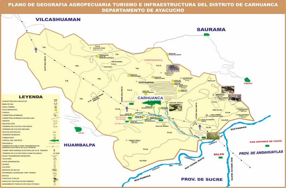 DISTRITO DE CARHUANCA - PROVINCIA DE VILCASHUAMAN - REGION AYACUCHO - PERU